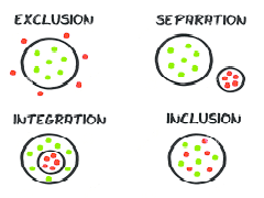 Définition de l'exclusion, la séparation, l'intégration et l'inclusion